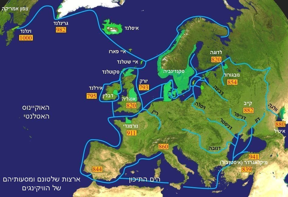 מסעות הוויקינגים